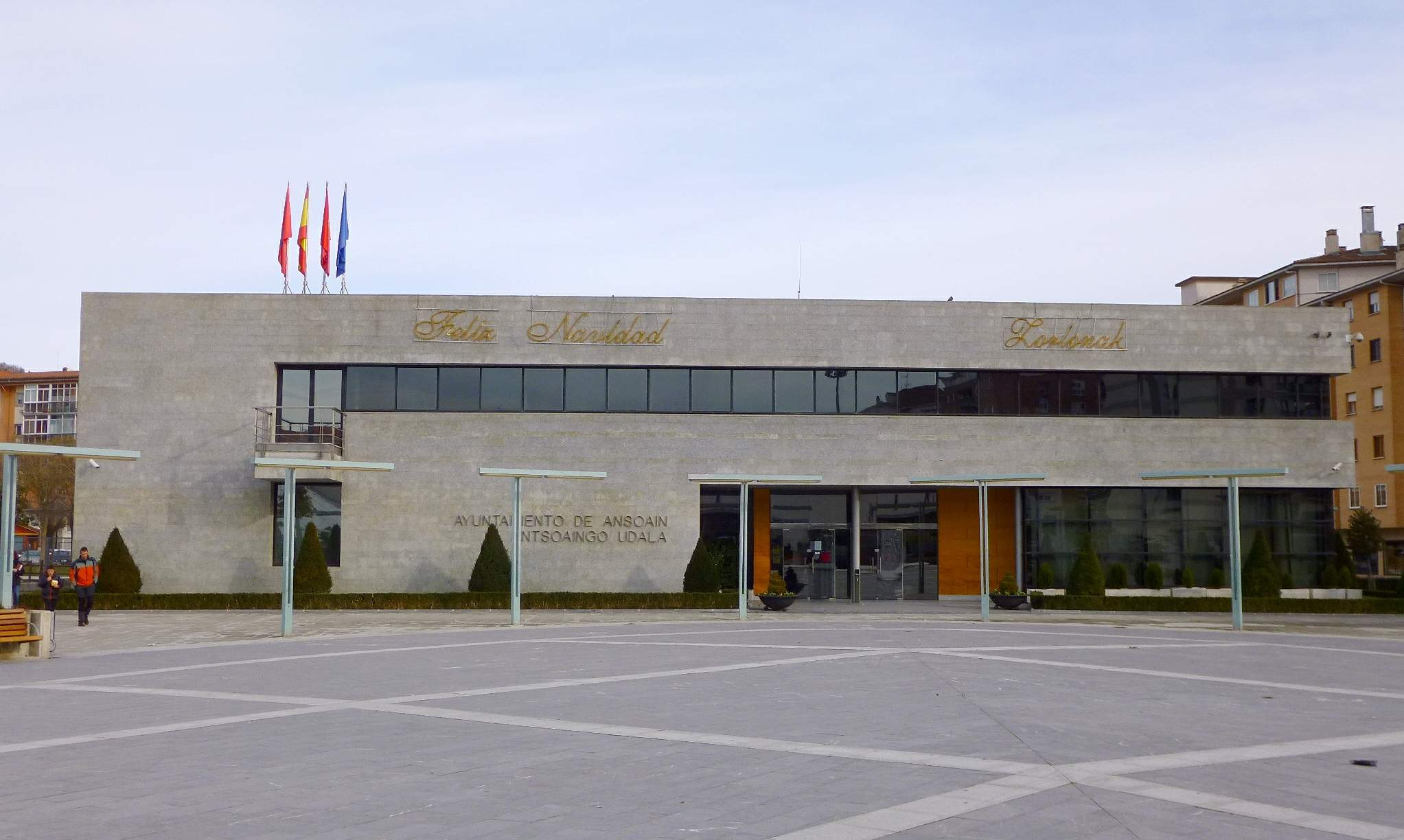 Ayuntamiento de Ansoáin (Navarra)